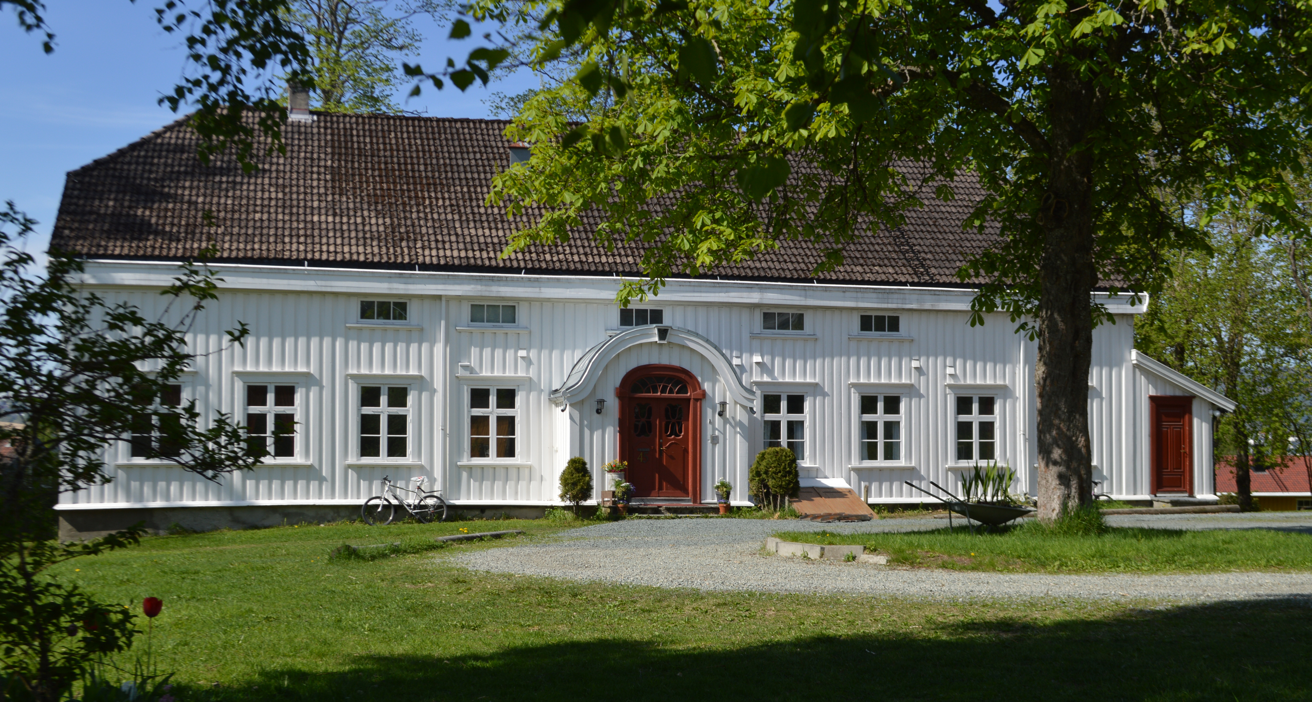 Berg prestegård i Trondheim